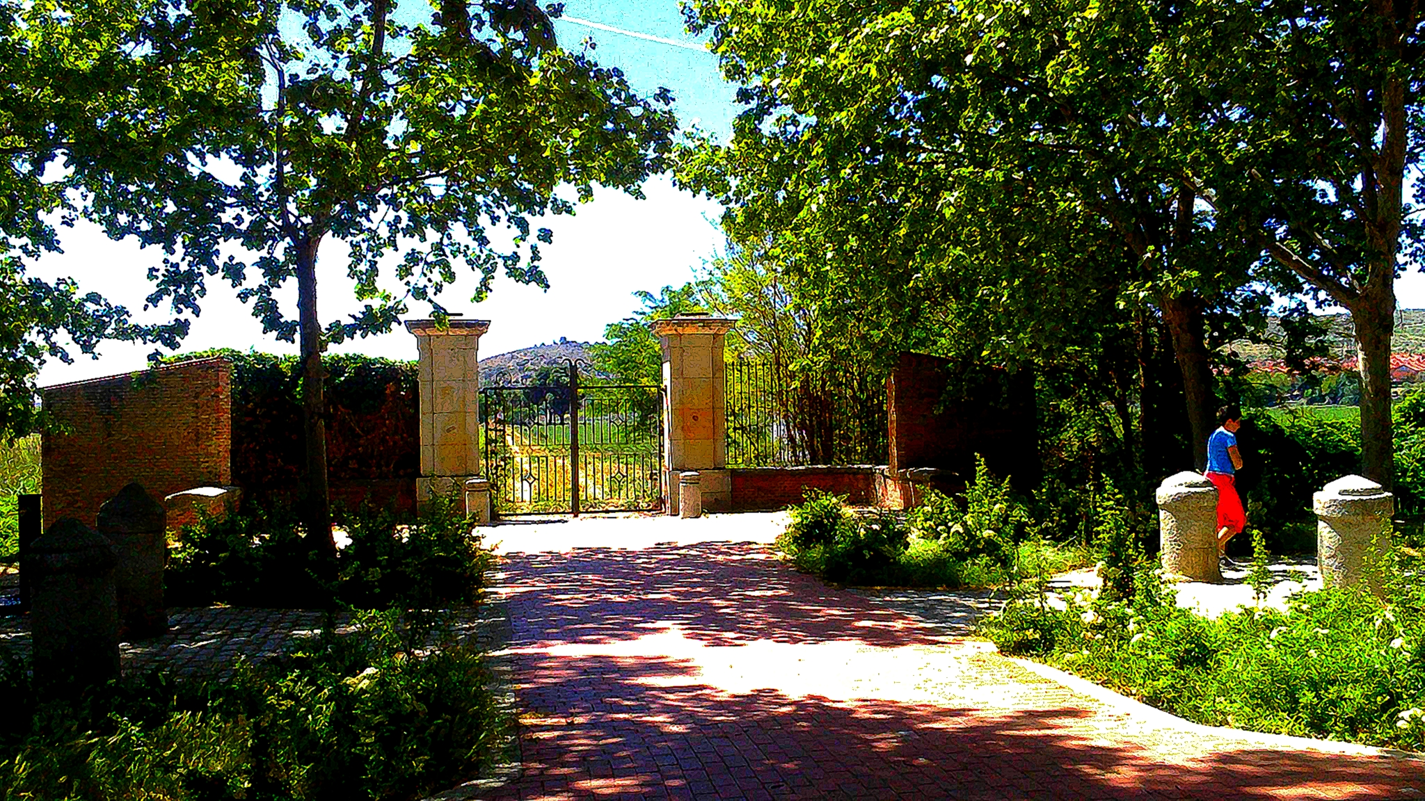 Puerta del Rey, Huerta Grande del Real Sitio de San Fernando de Henares.